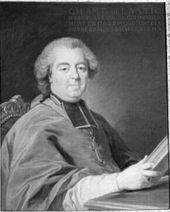 Monseigneur Antoine de Lastic de Sieujac (1709-1763), évêque de Comminges et de Châlons